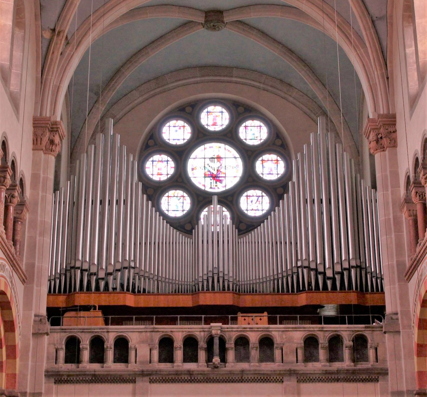 Orgel von St. Benno in München (1955-1965,Meisinger/Schwenk/Stöberl, III/56)